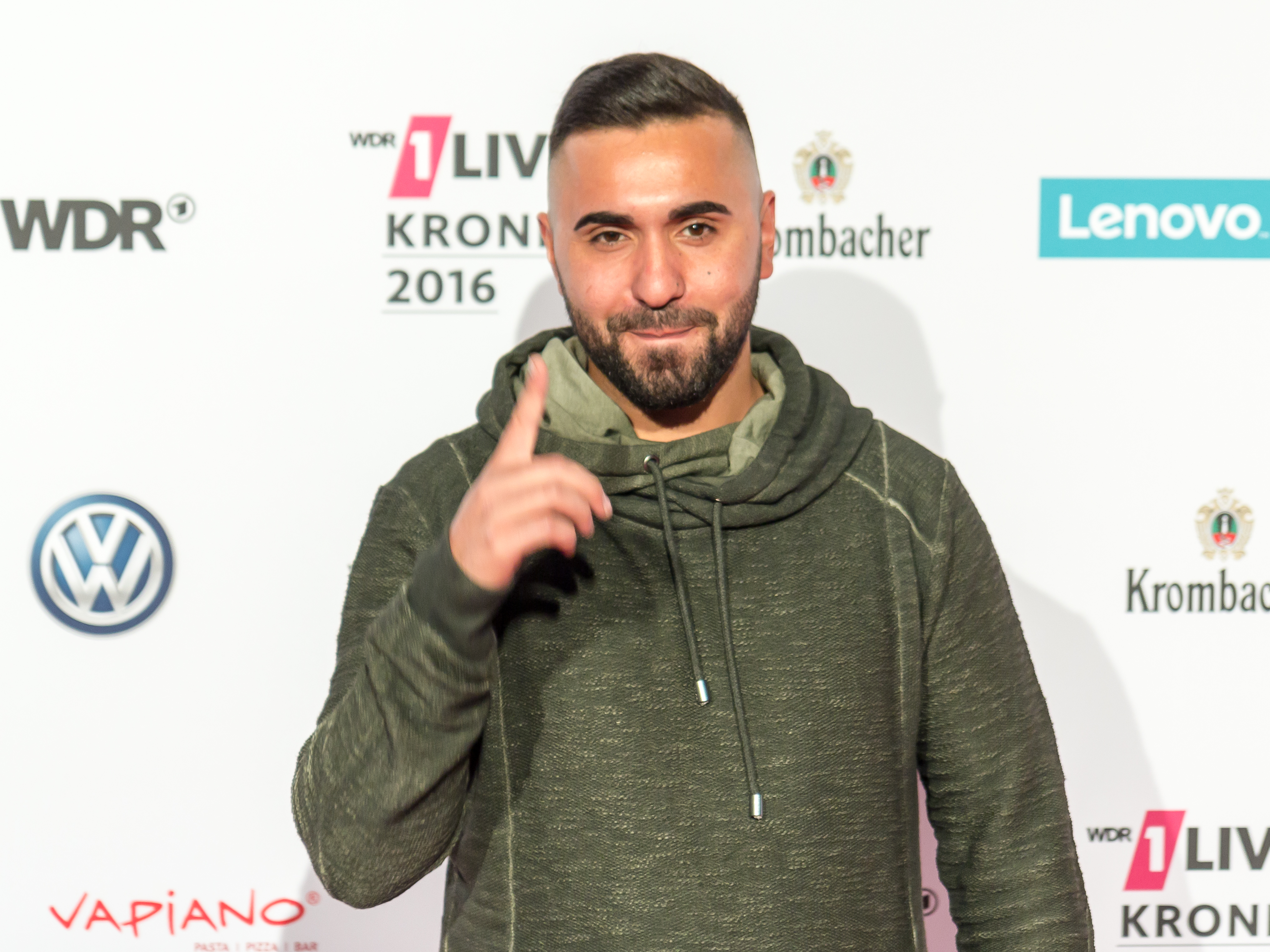 1LIVE Krone 2016 - 1700 - Roter Teppich - MoTrip